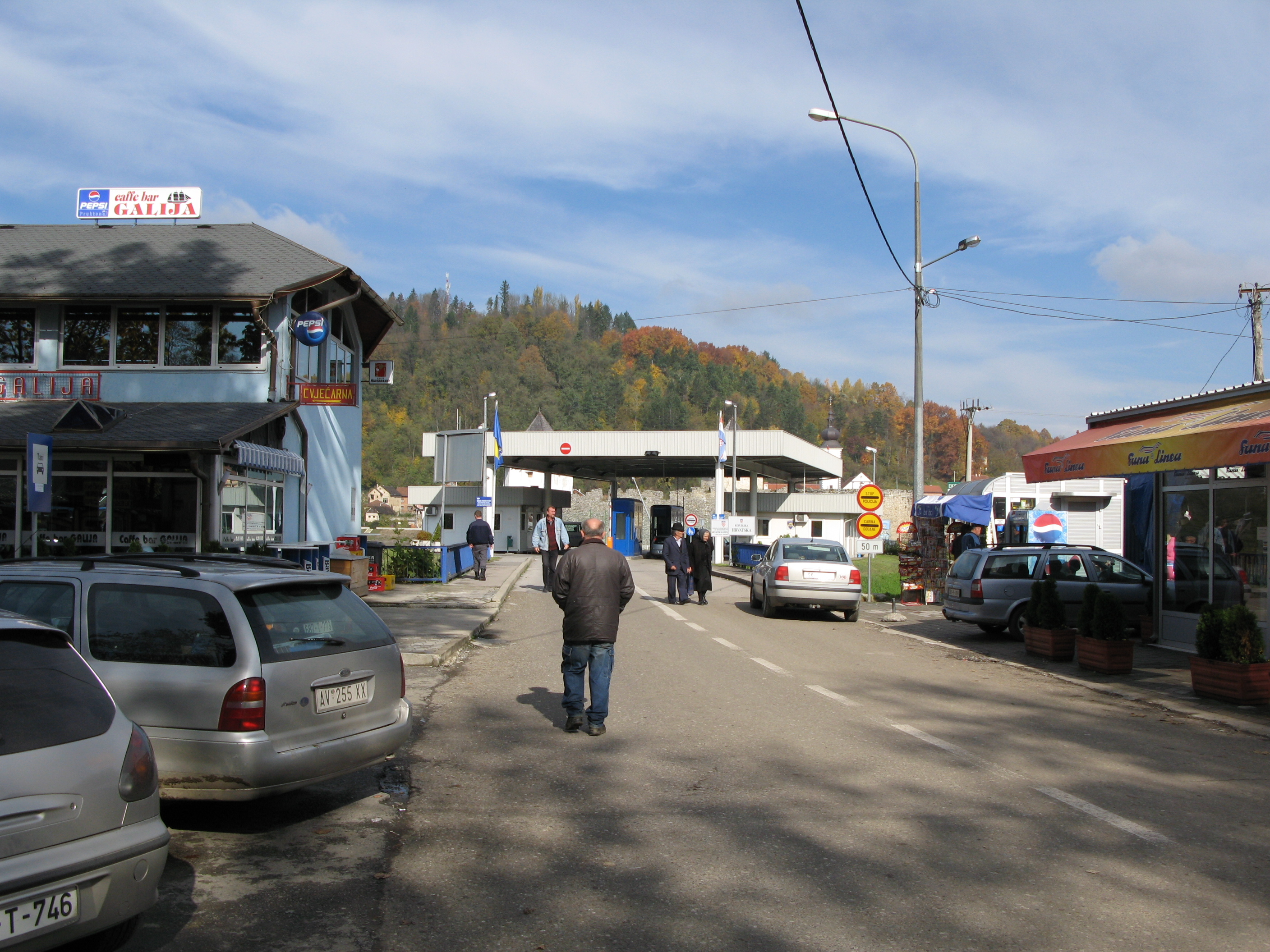 Српска Костајница. Граница.